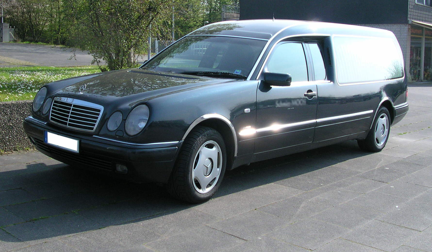 Leichenwagen von Rappold auf langem Mercedes-Benz-W210-Chassis